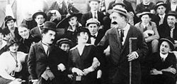 fotografía de la película Gentlemen of Nerve de Charlie Chaplin de 1914.